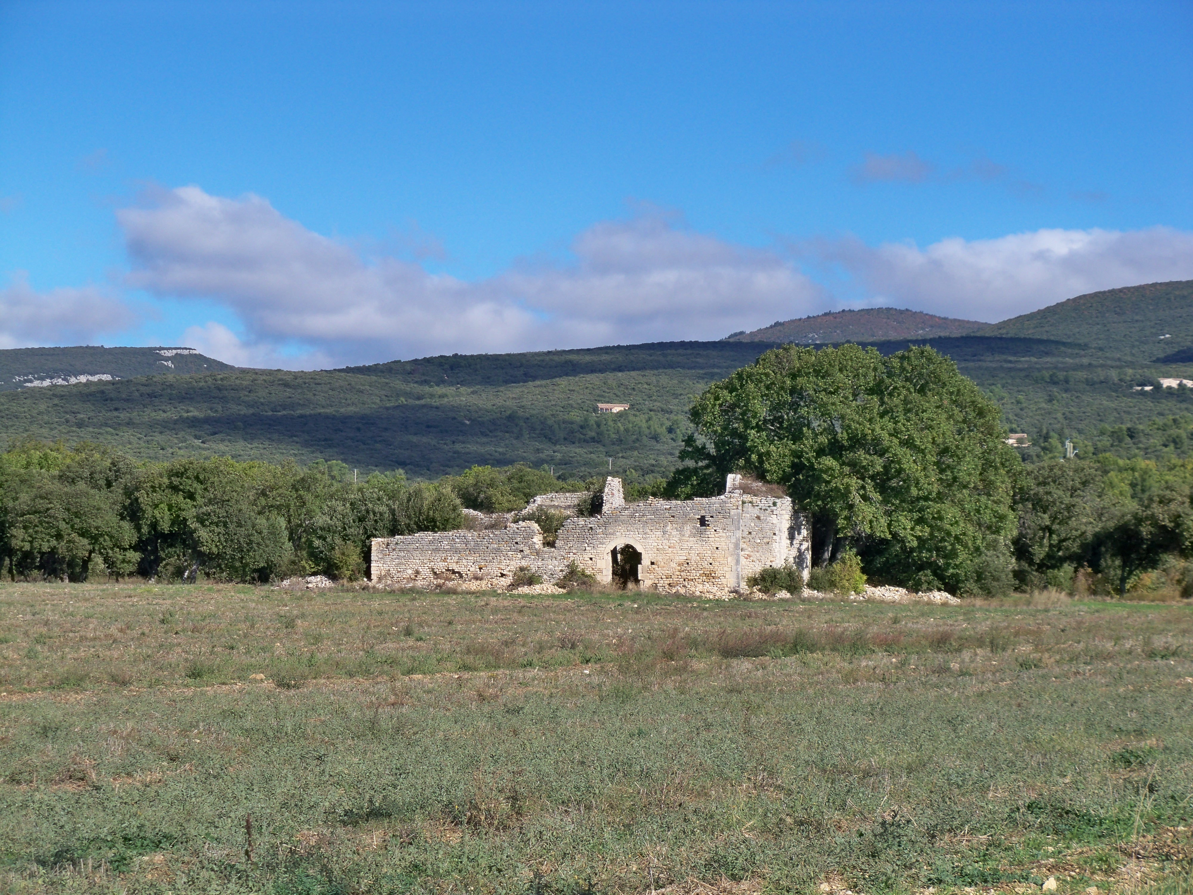 Prieuré Saint Julien à Rustrel, Vaucluse, France